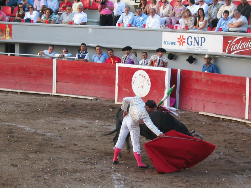 Matador (Bull fighter) en la Feria Nacional de San Marcos en Aguascalientes 2006, Mexico.